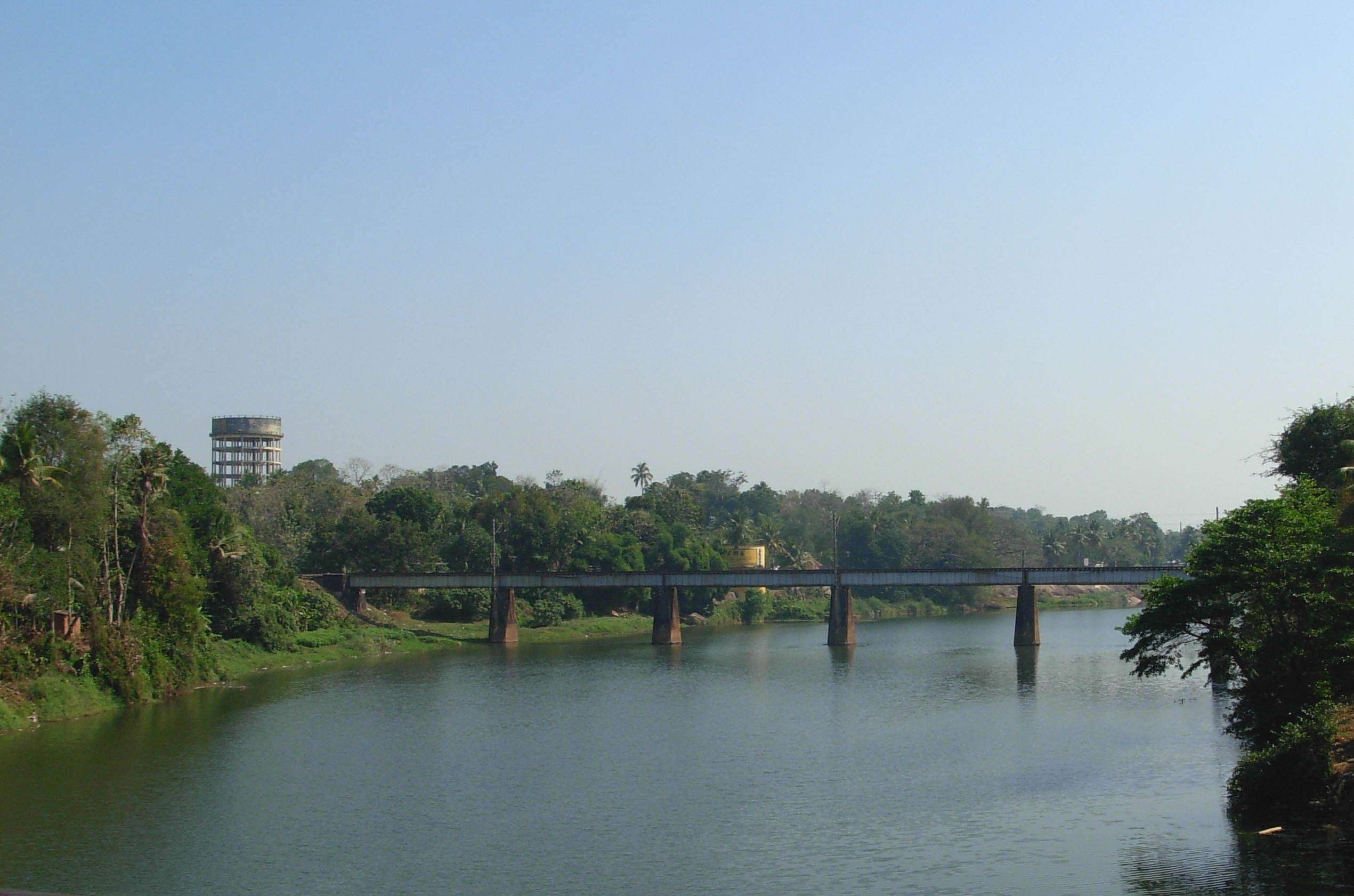 പമ്പയാറിനു കുറുകെയുള്ള റയിൽ പാലം.ചെങ്ങന്നൂരിനും തിരുവല്ലക്കുമിടയിലുള്ള കല്ലിശ്ശേരിയിലെ ദൃശ്യം. തിരുവല്ലയിലേക്കുള്ള ശുദ്ധജല വിതരണപദ്ധതിയുടെ ജലസംഭരണിയും കാണാം.